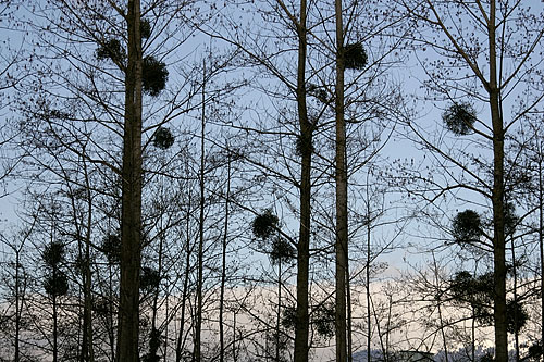 Yverdon: Misteln (des guis)